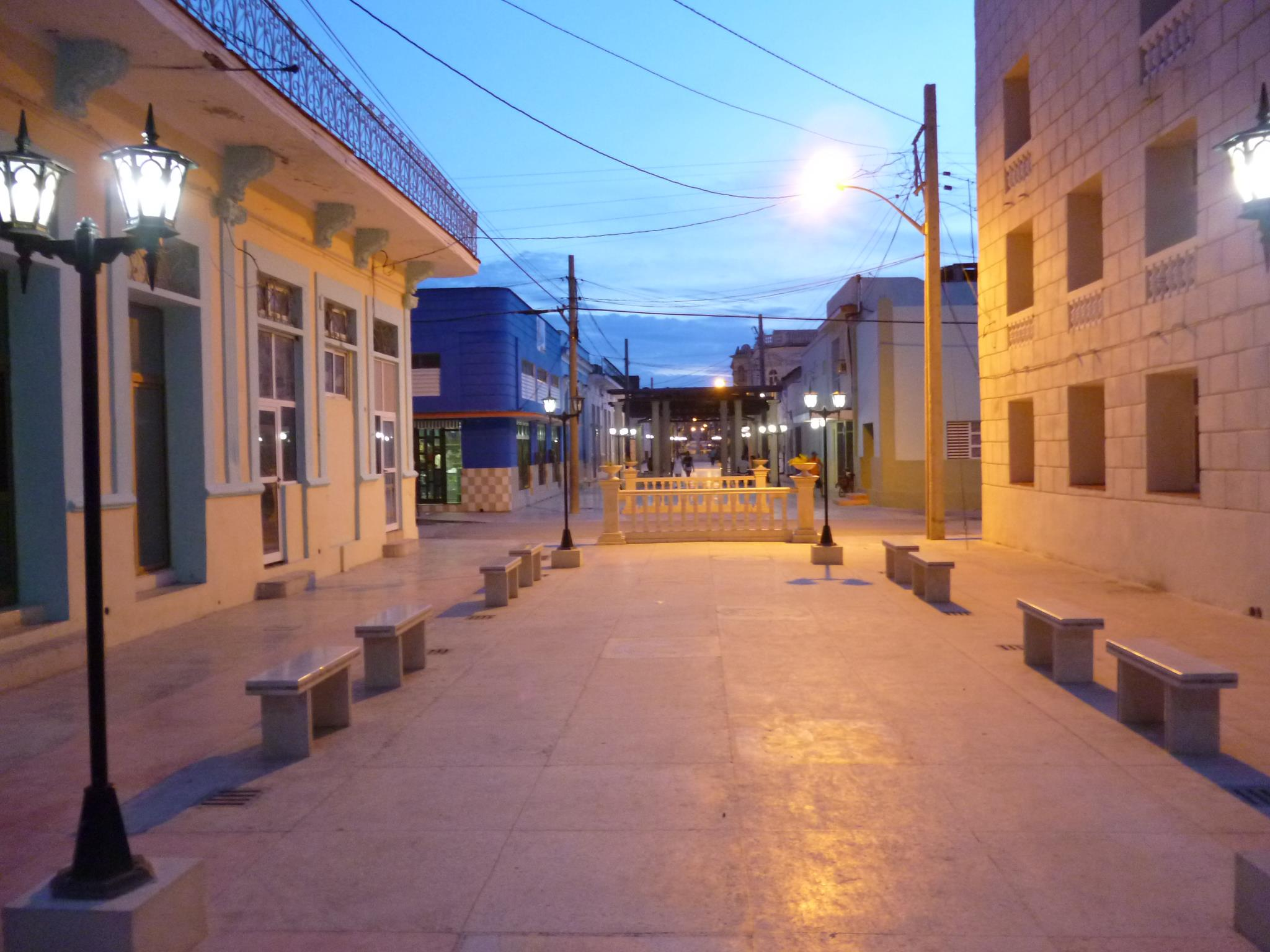 Calle Martí, cercano a la Plaza Central